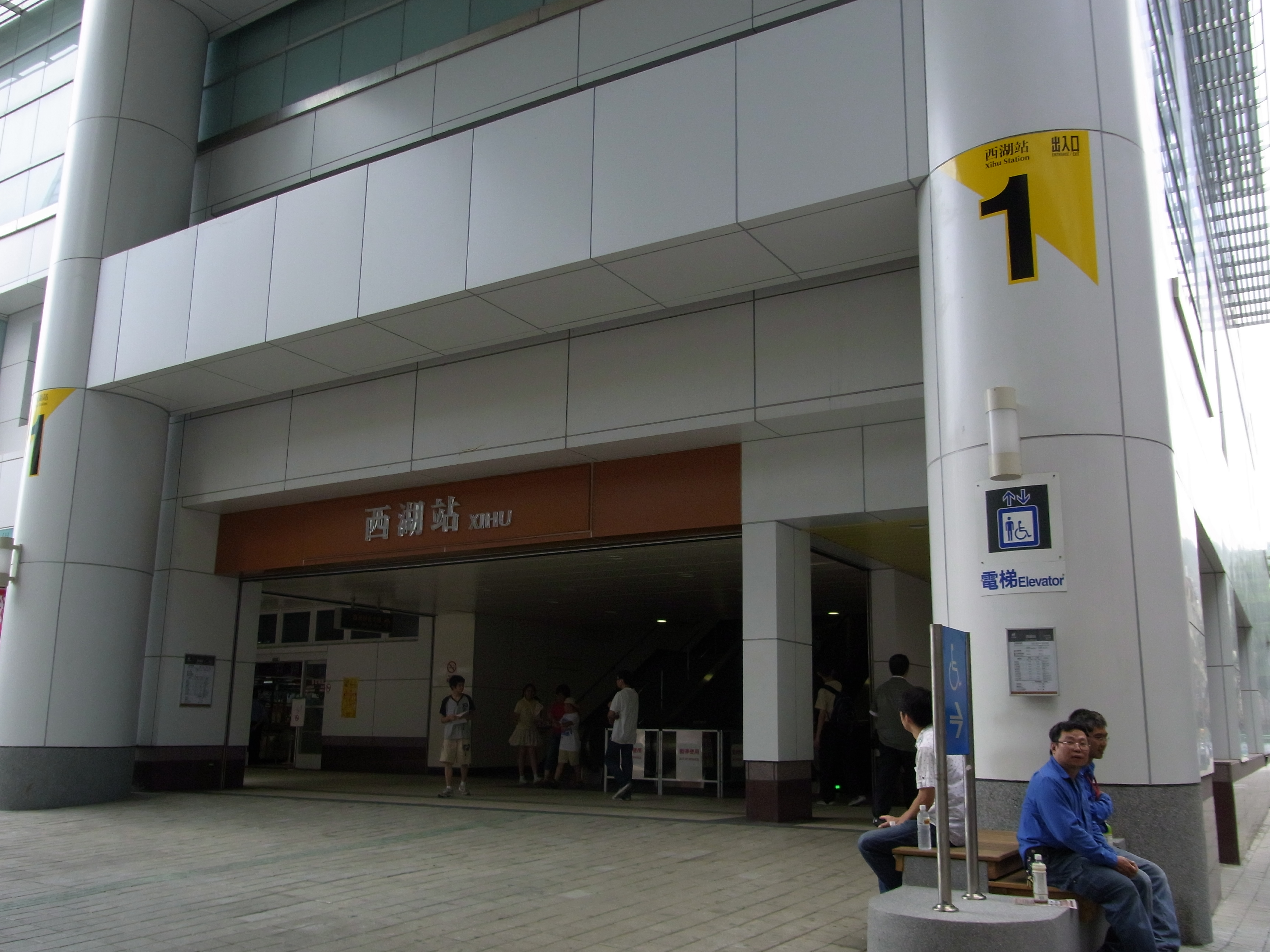 中文（台灣）: 台北捷運內湖線西湖站1號出口。